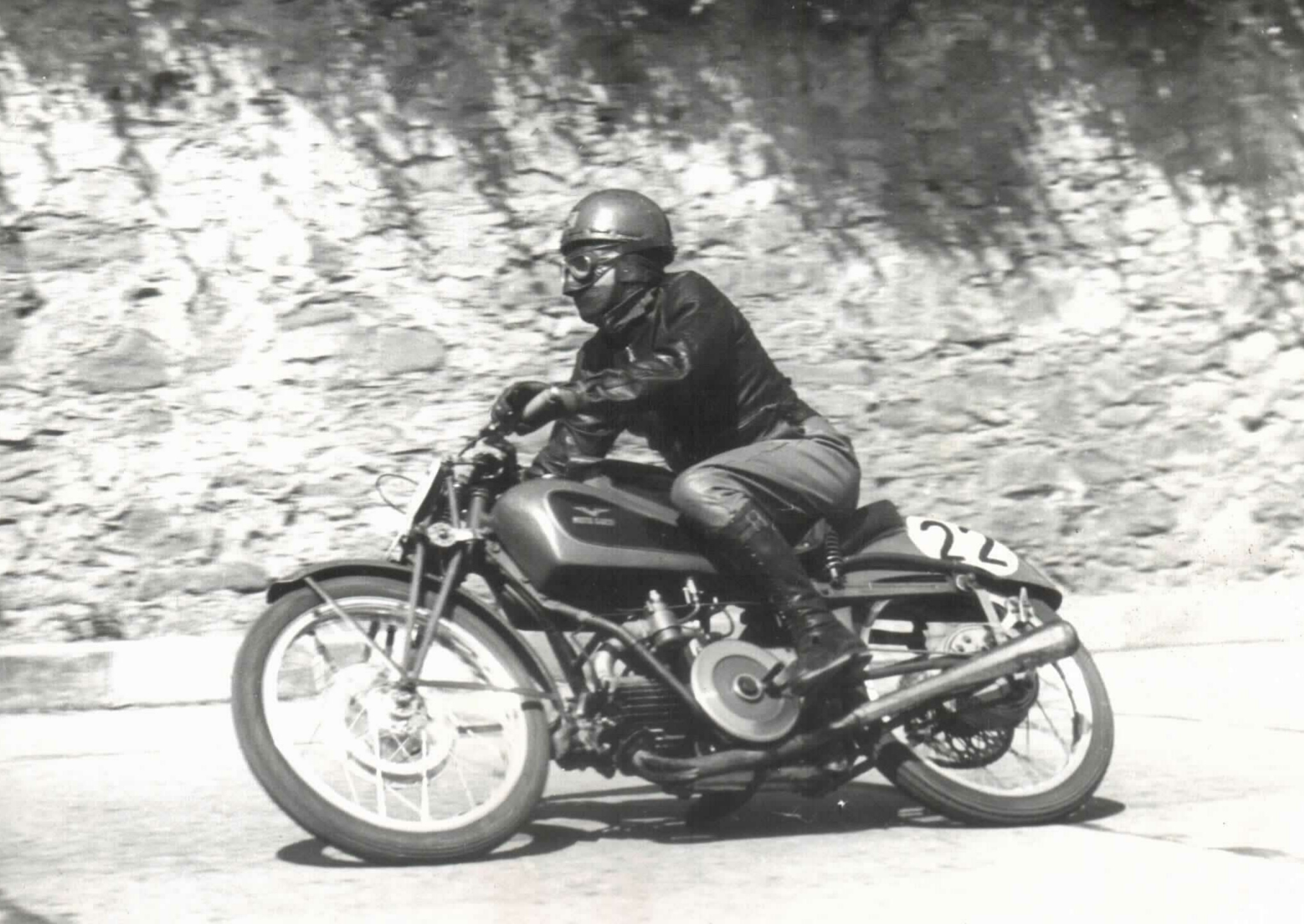 il pilota Raccagni alla Sanremo-Ospedaletti del 1949